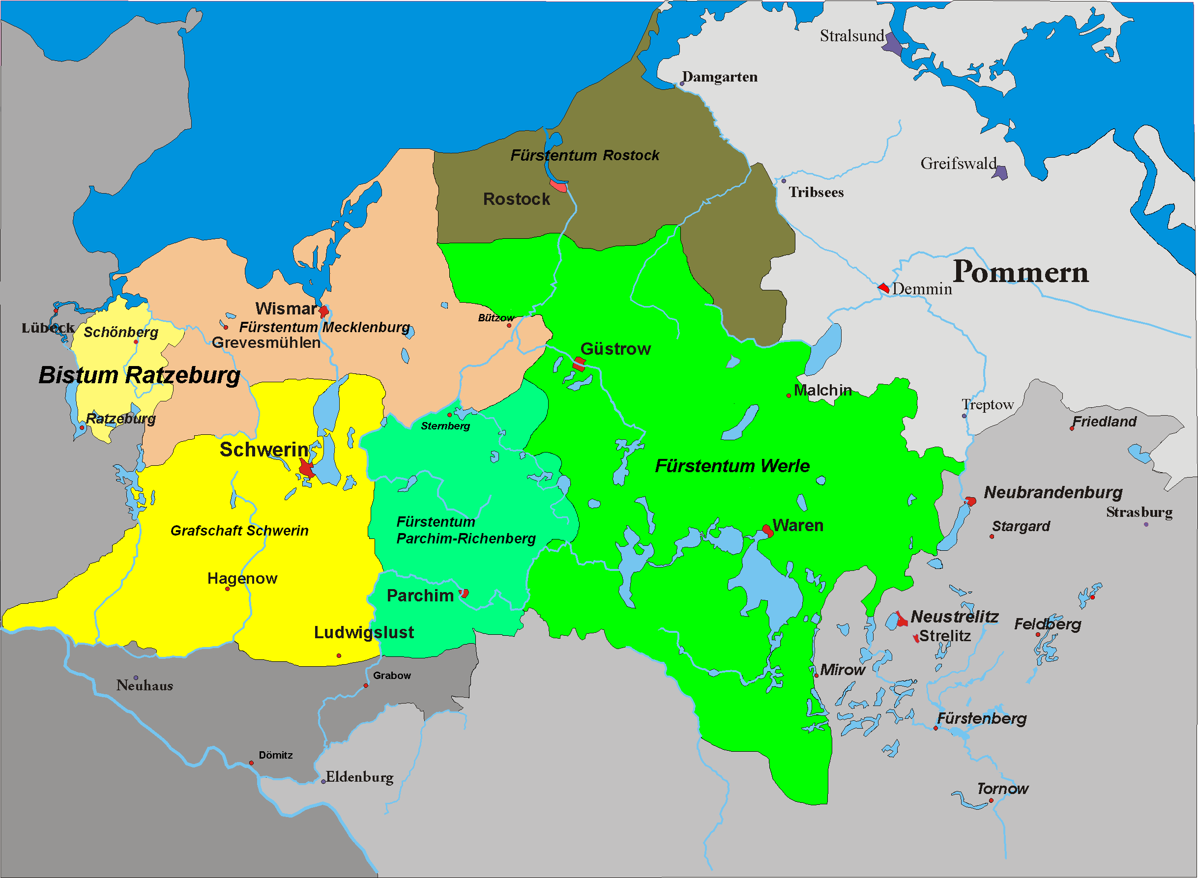 Karte von Mecklenburg um 1250